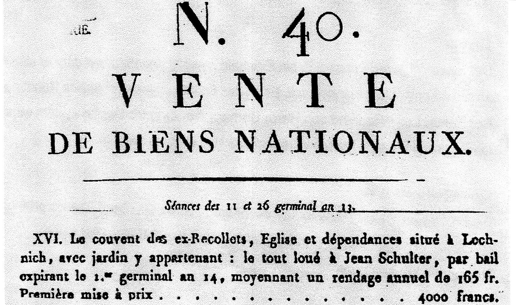 Lechenich, Verkauf der Liegenschaft des Franziskanerordens im Jahr 1805